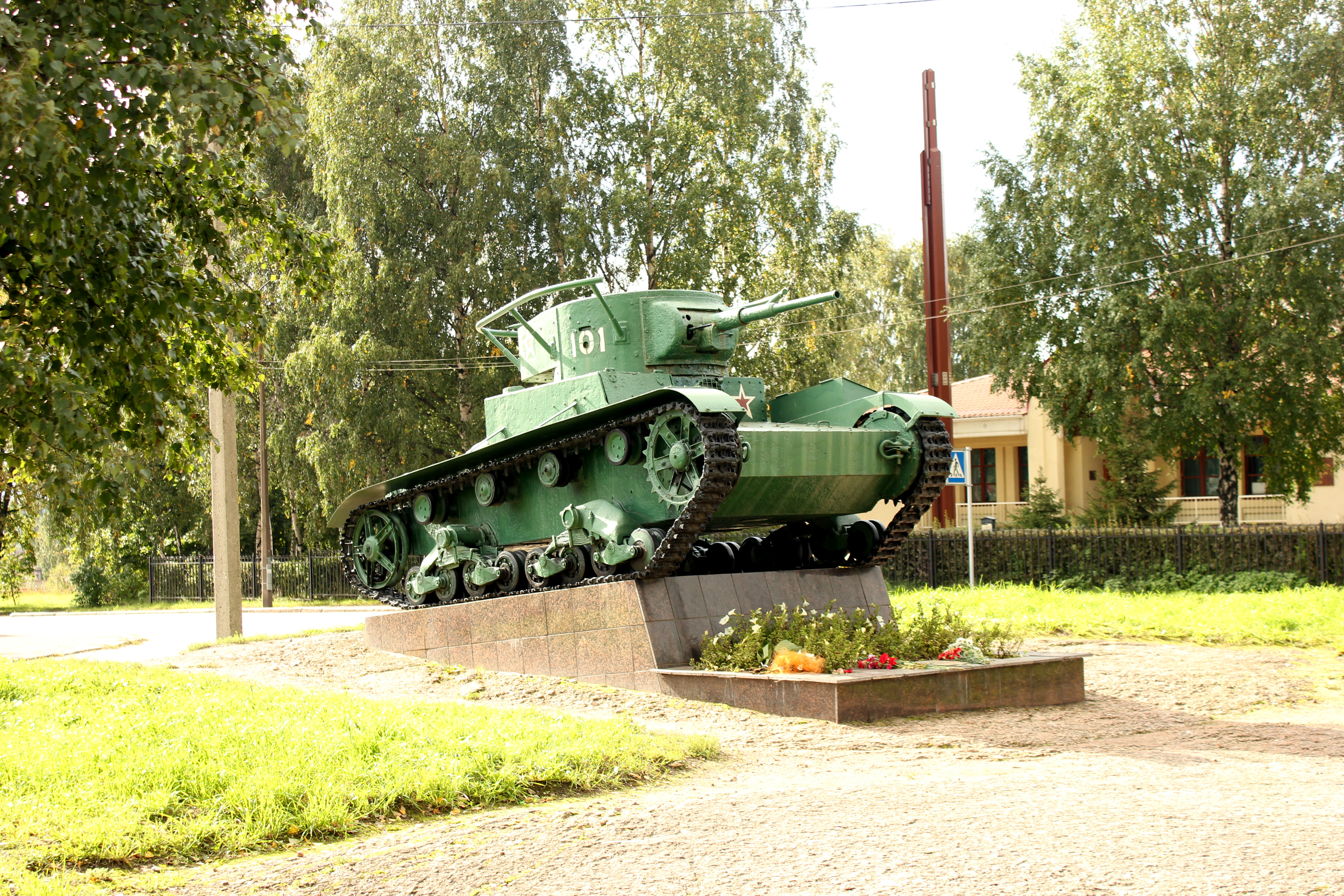 Лёгкий командирский танк Т-26.